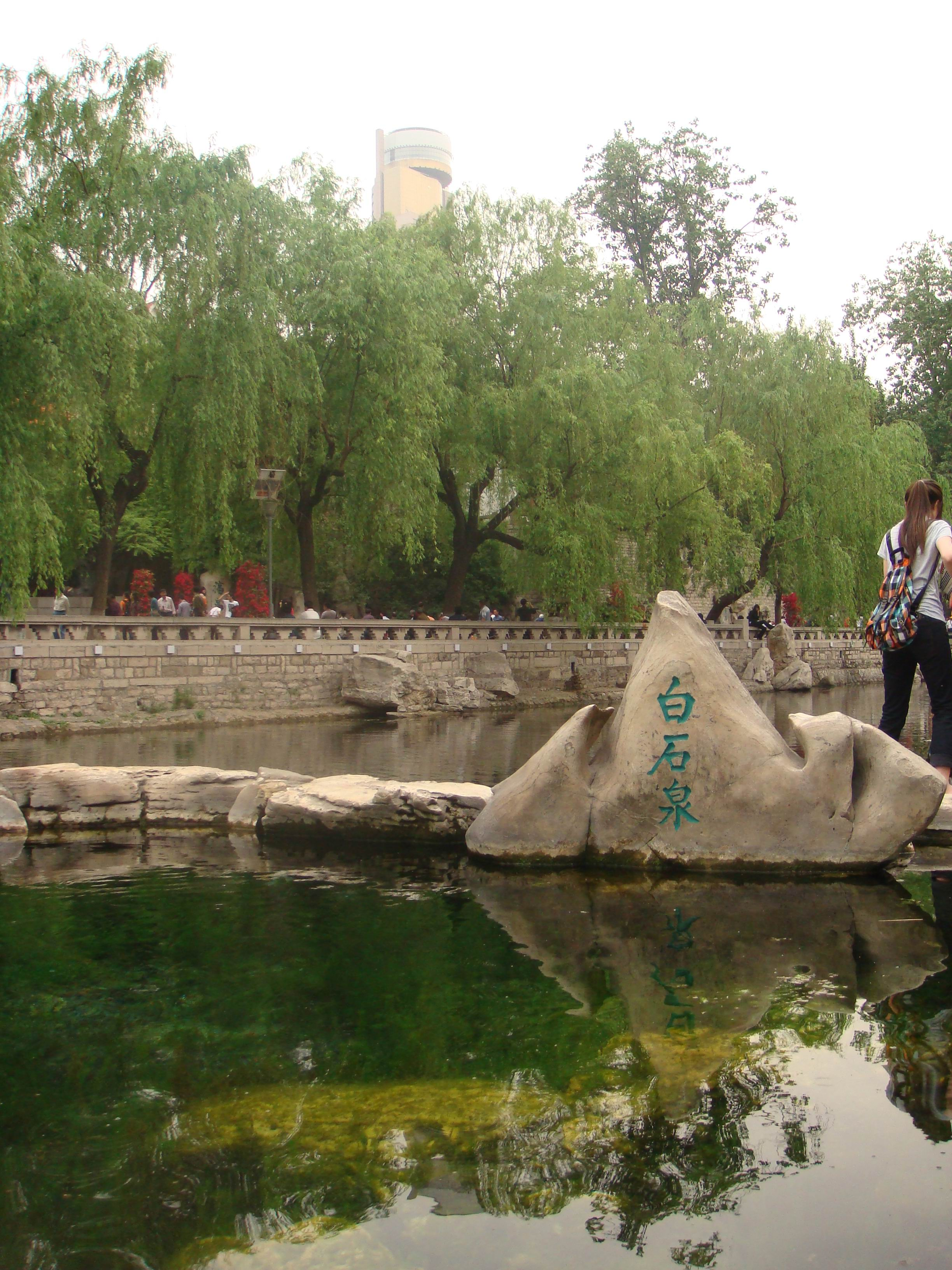 济南护城河边的白石泉。